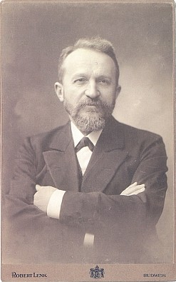 Josef Taschek (1857 - 1939), Český a československý politik německé národnosti.